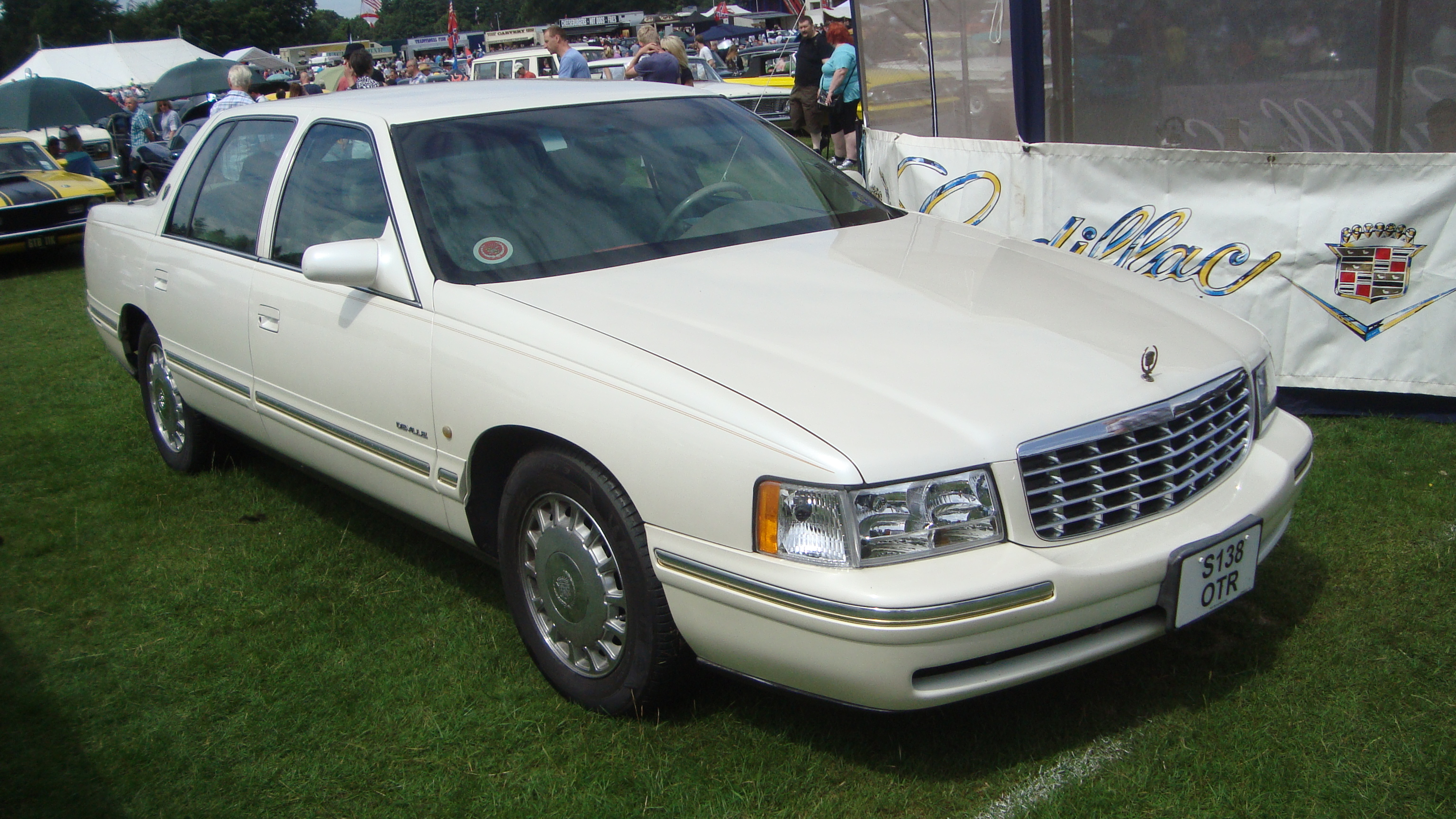 1999 Cadillac DeVille 4.6 V8